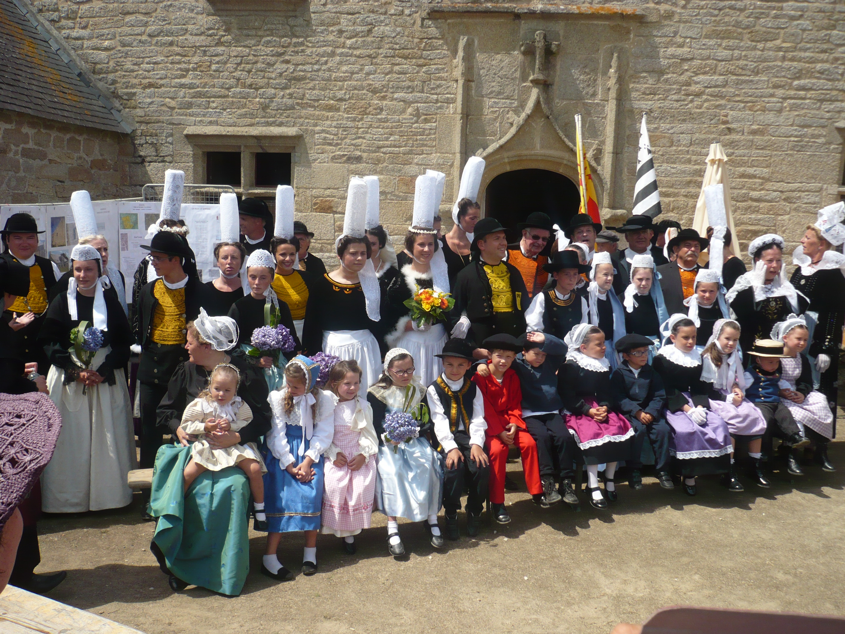 Bigounden Trachten der Frauen und Männder